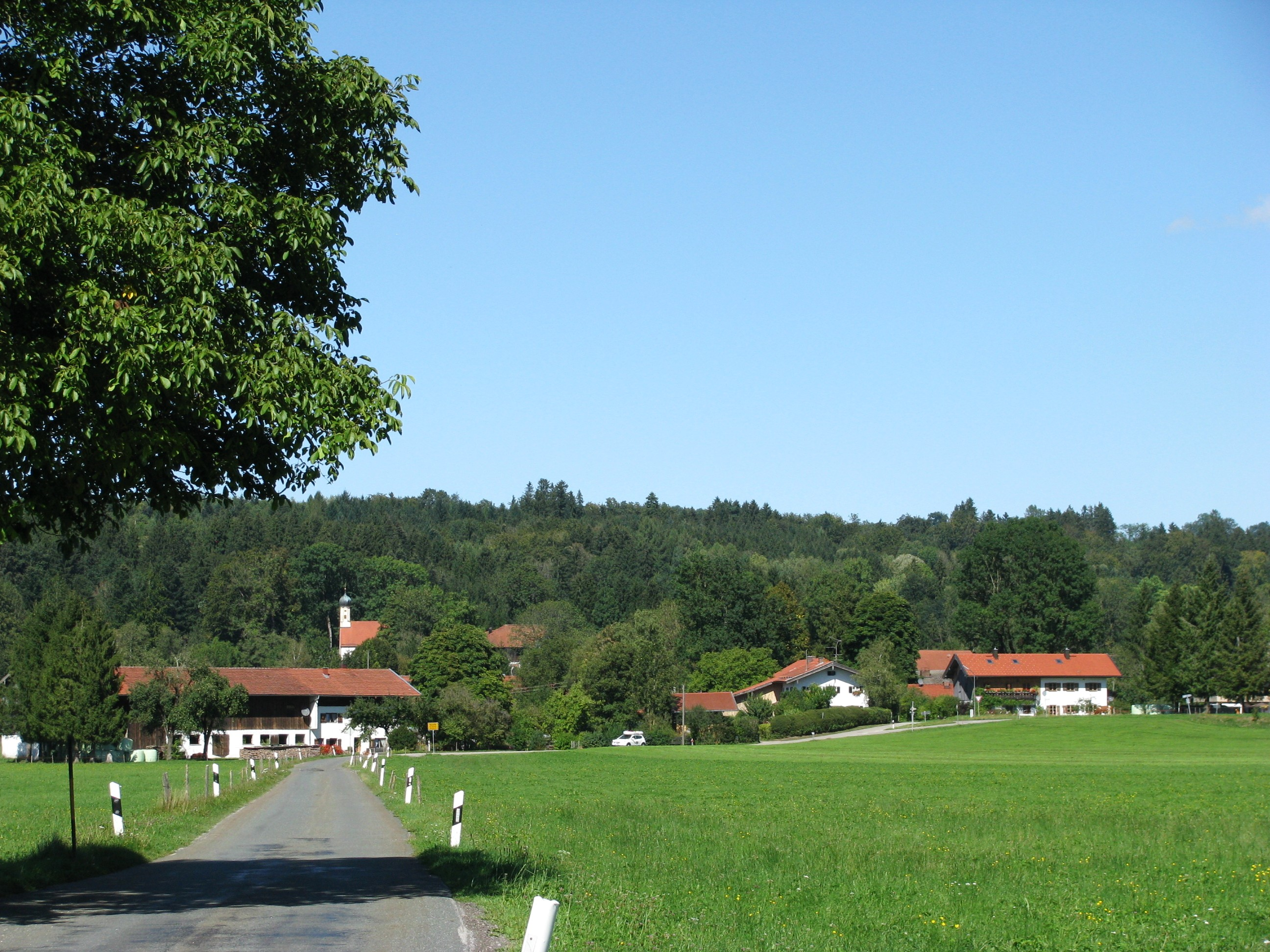 Bairawies aus südlicher Richtung